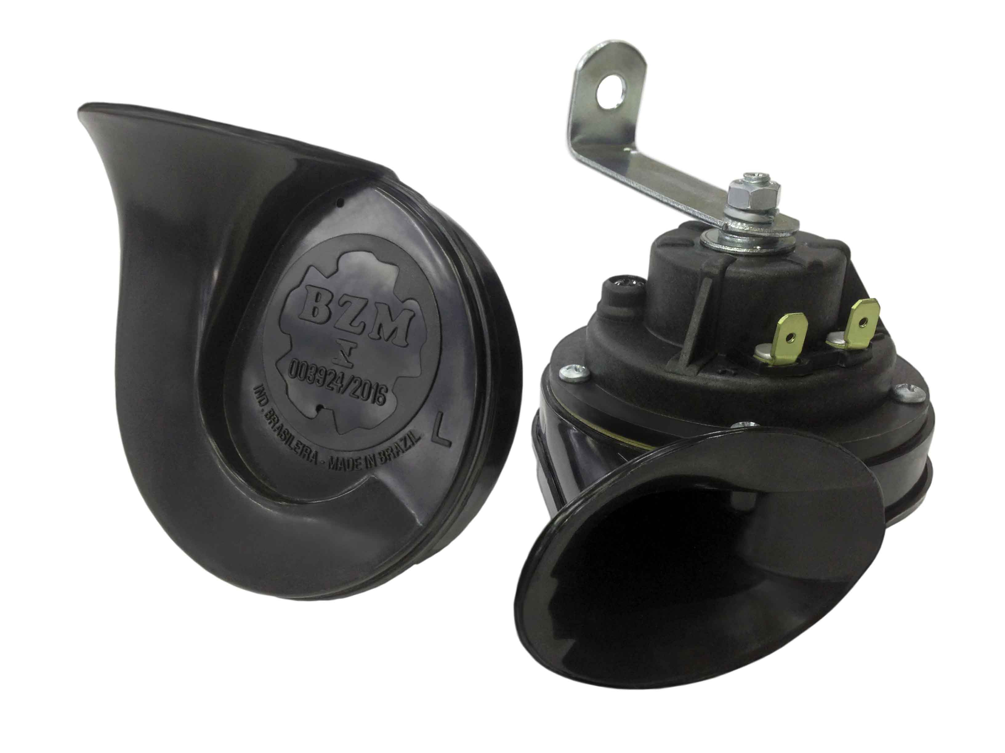 Buzina família eletromagnética modelo Caracol